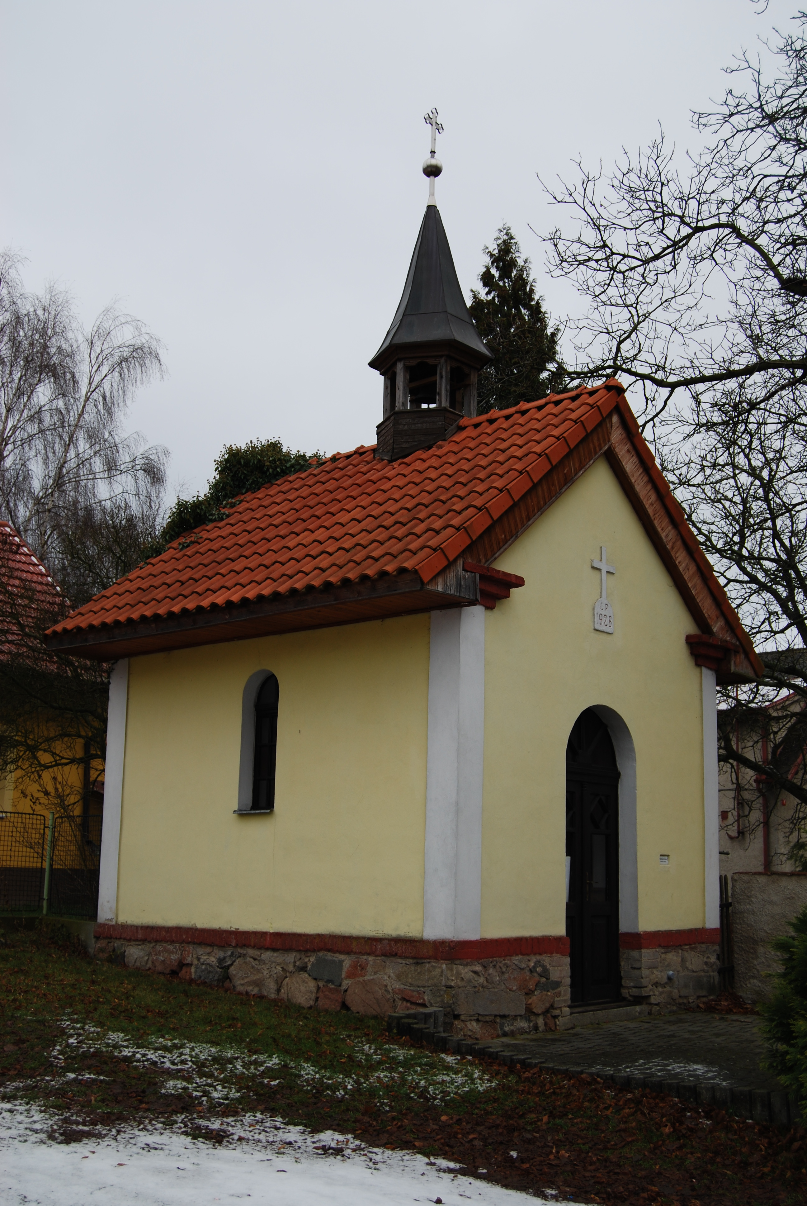 Kaple v obci. Obec Lazsko v okrese Příbram, kraj Středočeský. Česká republika. - OpenStreetMap (Info)